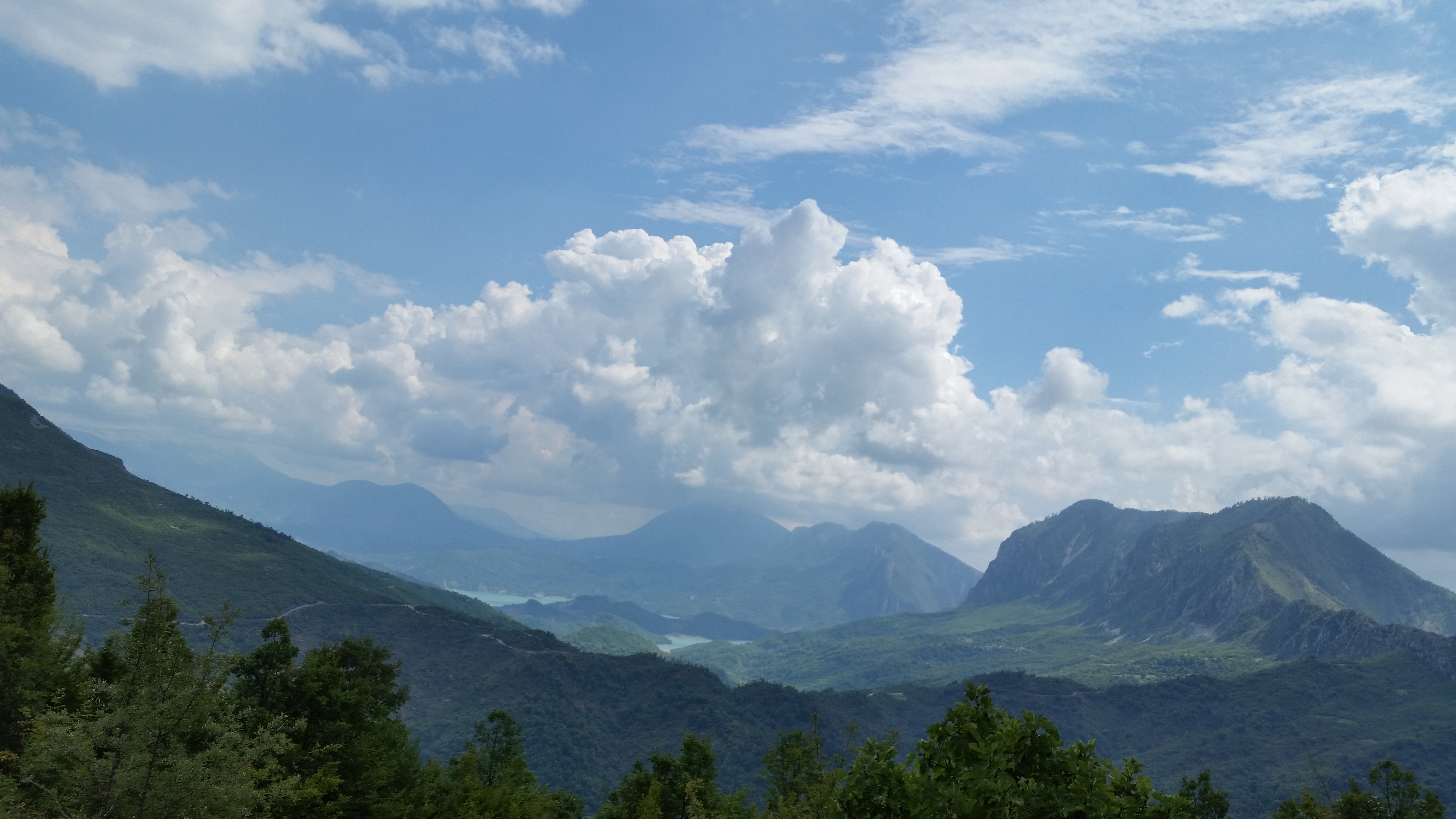 Qafe Shtame, Kruje